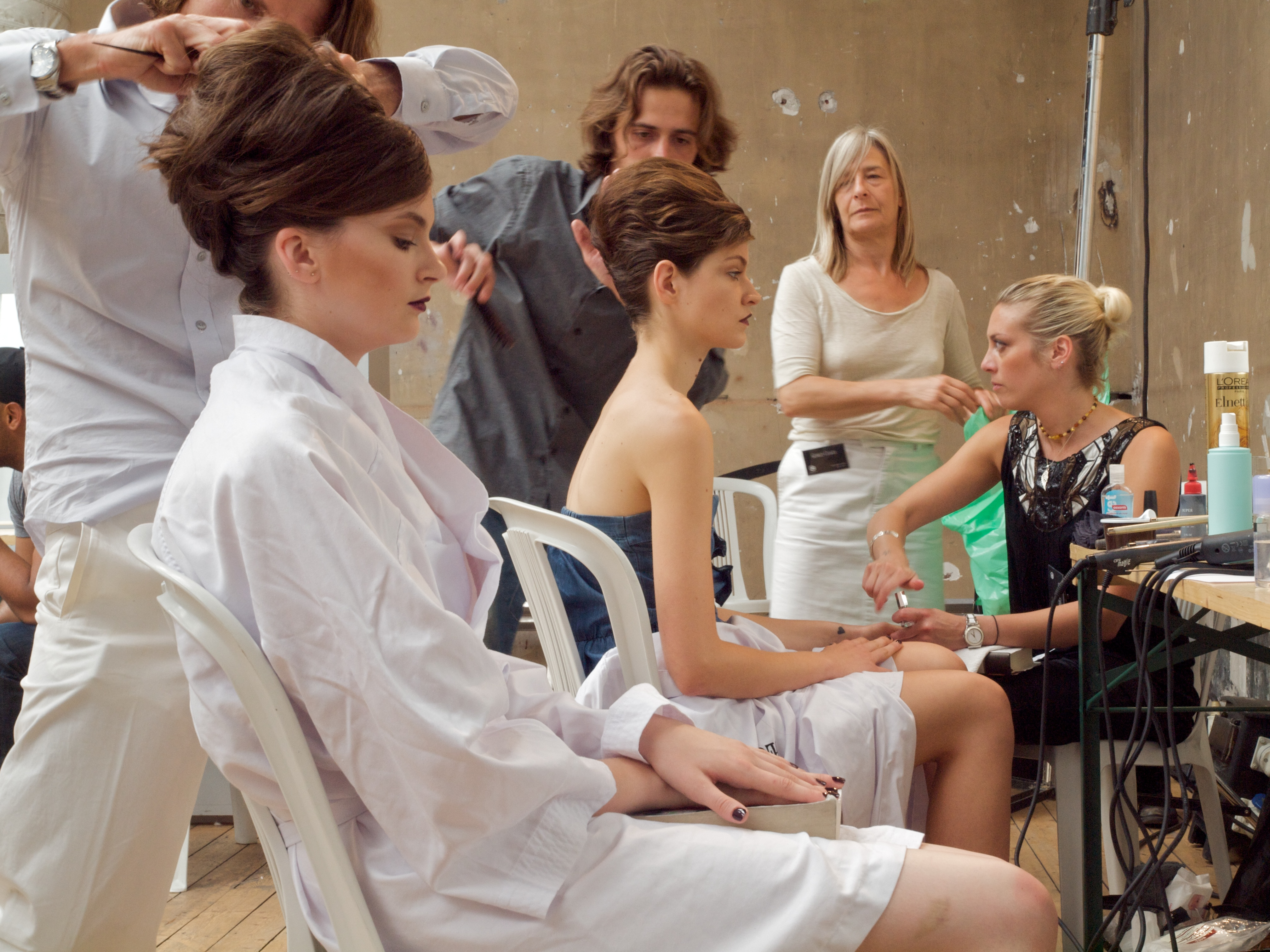 Haute Couture Autumn/Winter 2010-2011